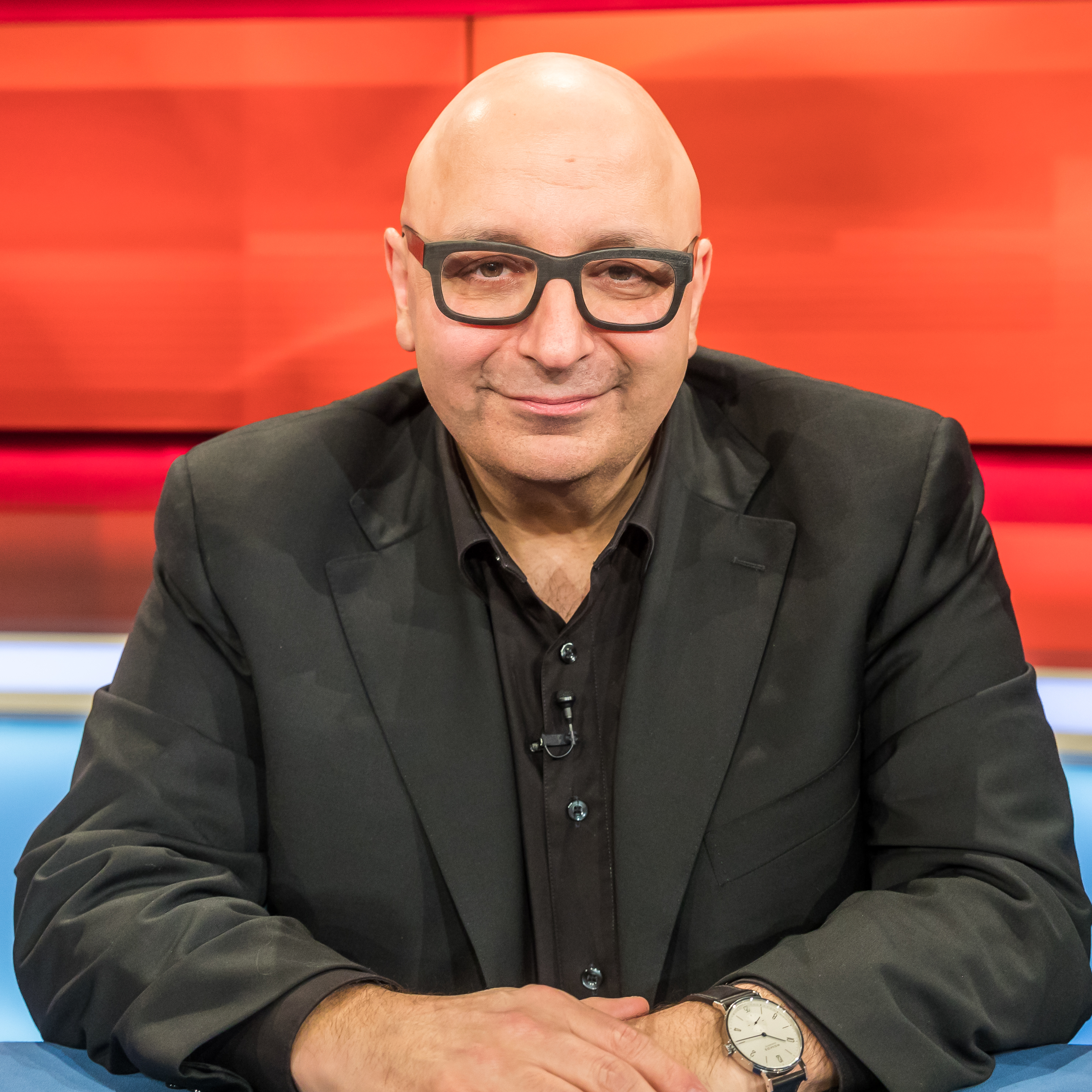 Hart aber fair, Sendung vom 25. Februar 2019. Frank Plasberg diskutiert das Thema: „Heimat Deutschland - nur für Deutsche oder offen für alle?" Foto: Armin Nassehi, Professor für Soziologie an der Ludwig-Maximilians-Universität München